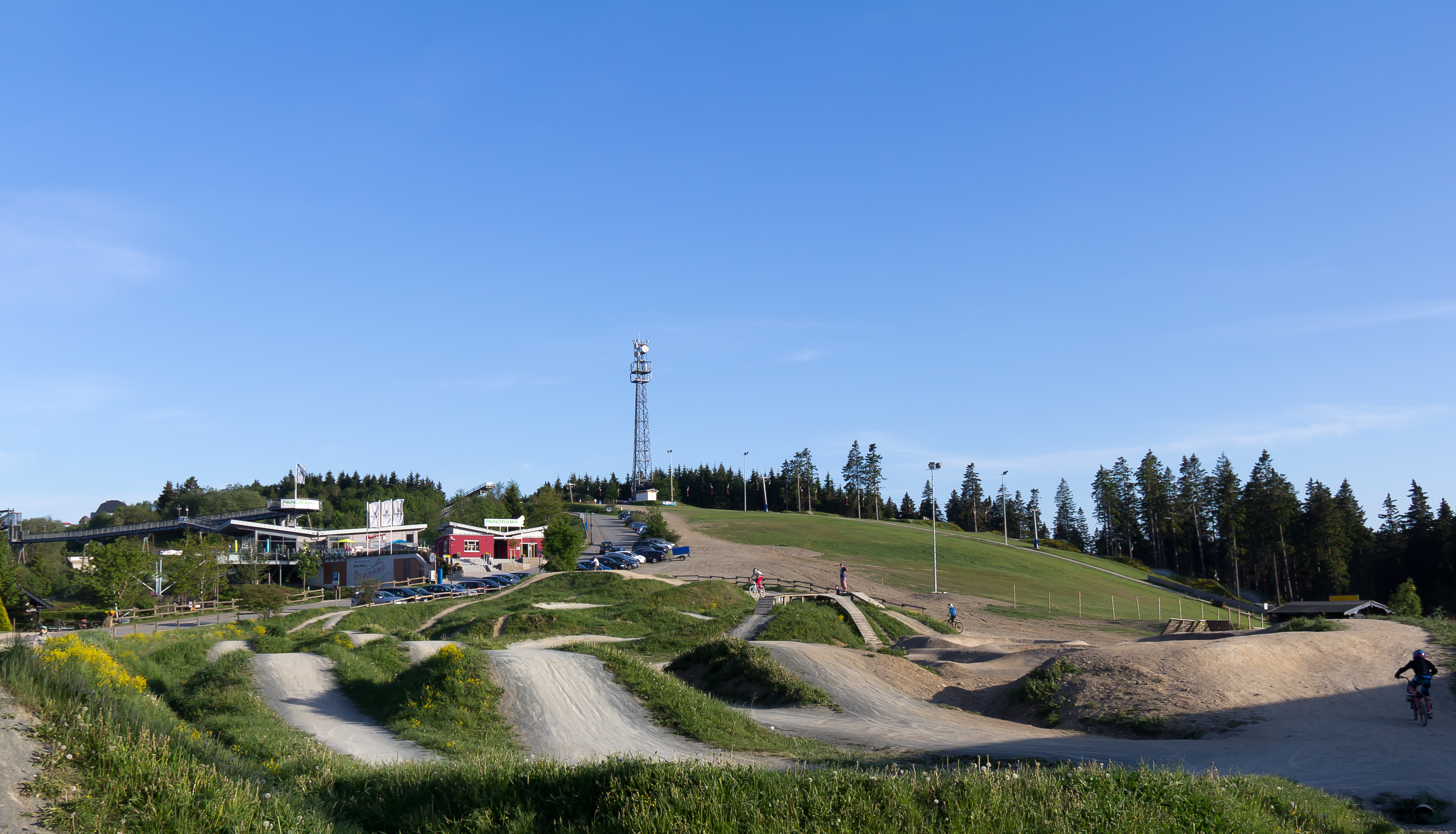 Mountainbike-Übungsparcour des Bikepark Winterberg, im Hintergrund der Gipfel des Kappe